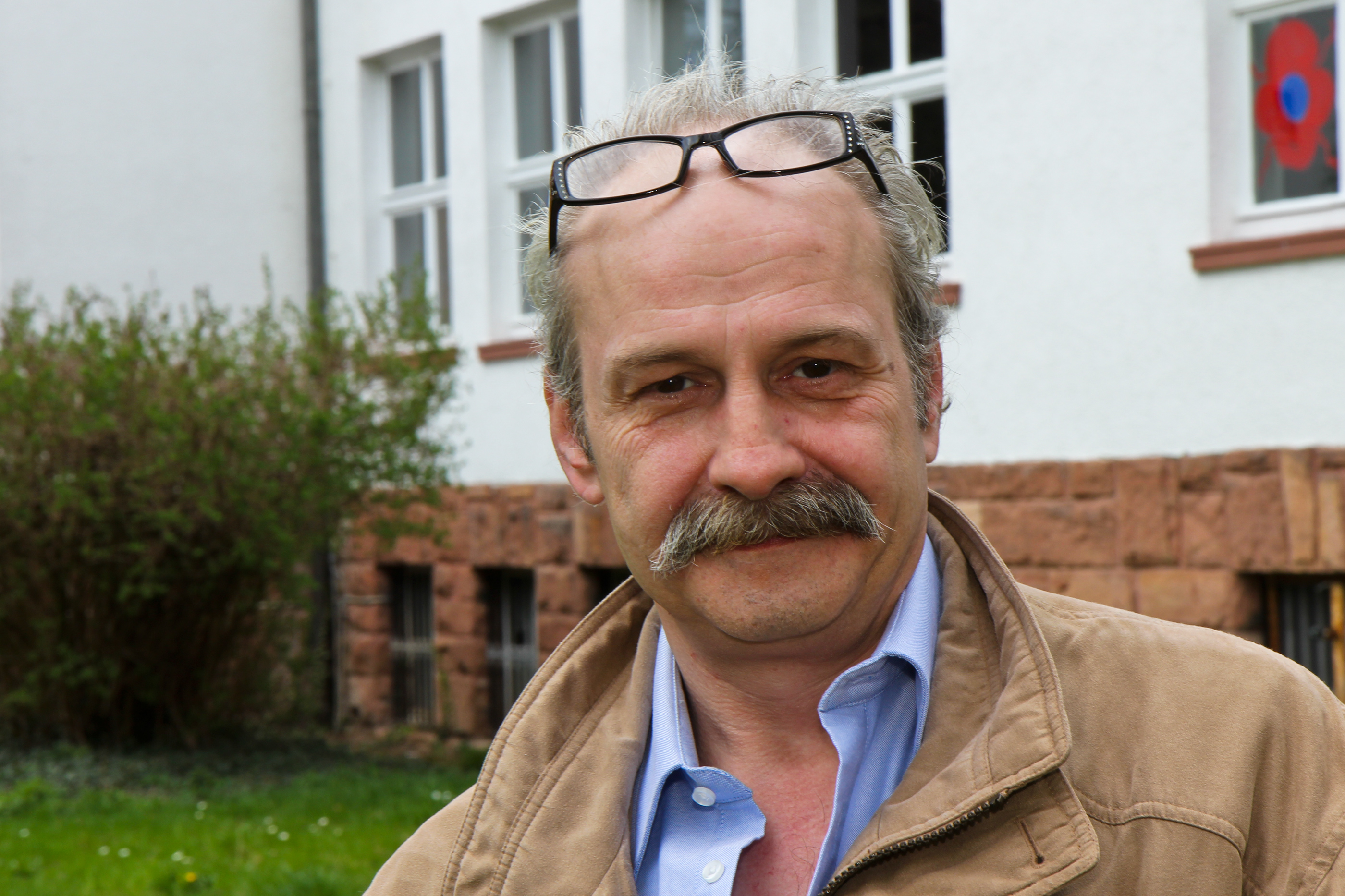 Dieter Wollny, Vater der Familie Wollny (RTL II)